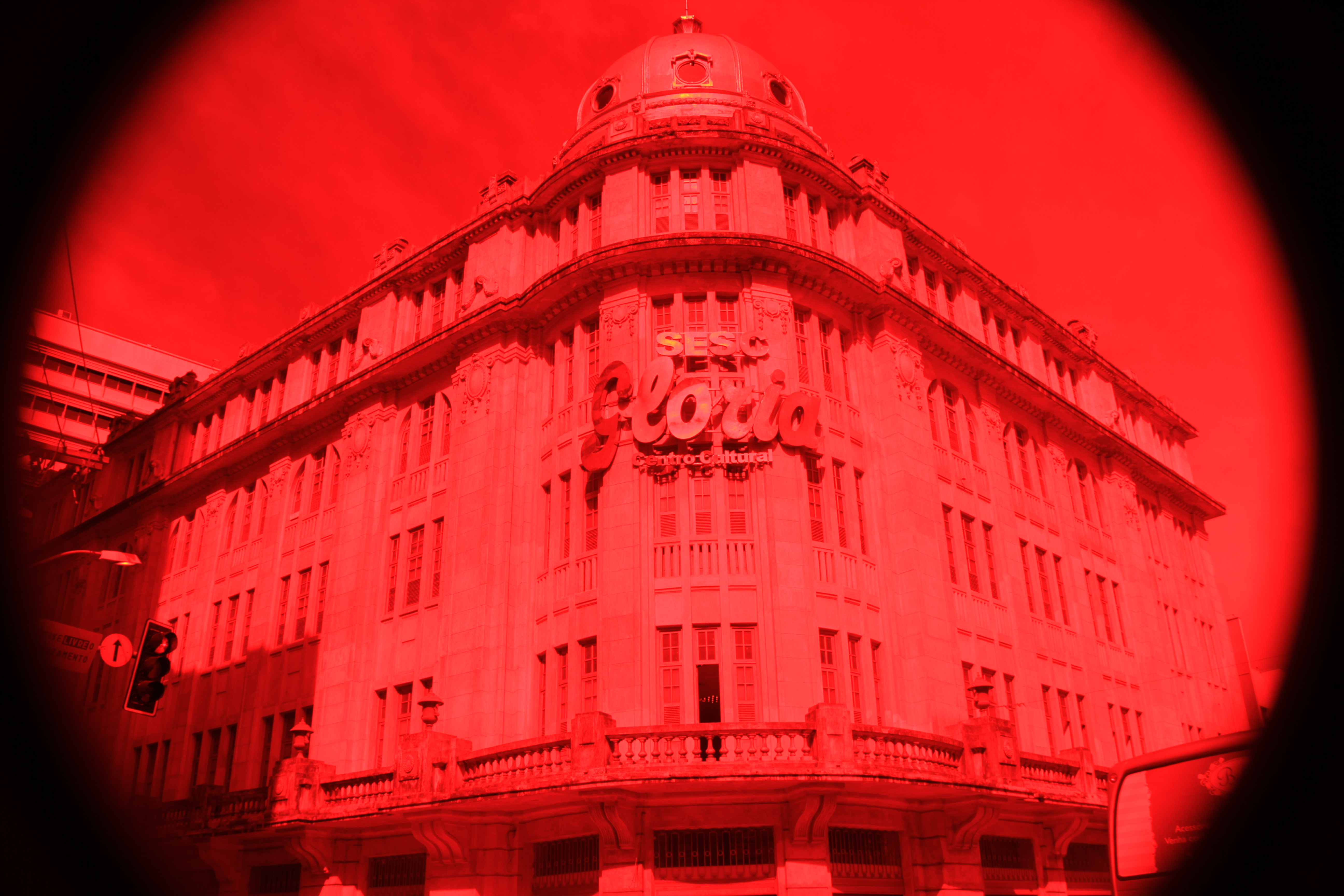 cine teatro glória